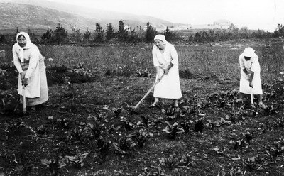 שלוש בנות מ"חוות העלמות" של חנה מייזל עובדות בגינת הירק ליד החצר